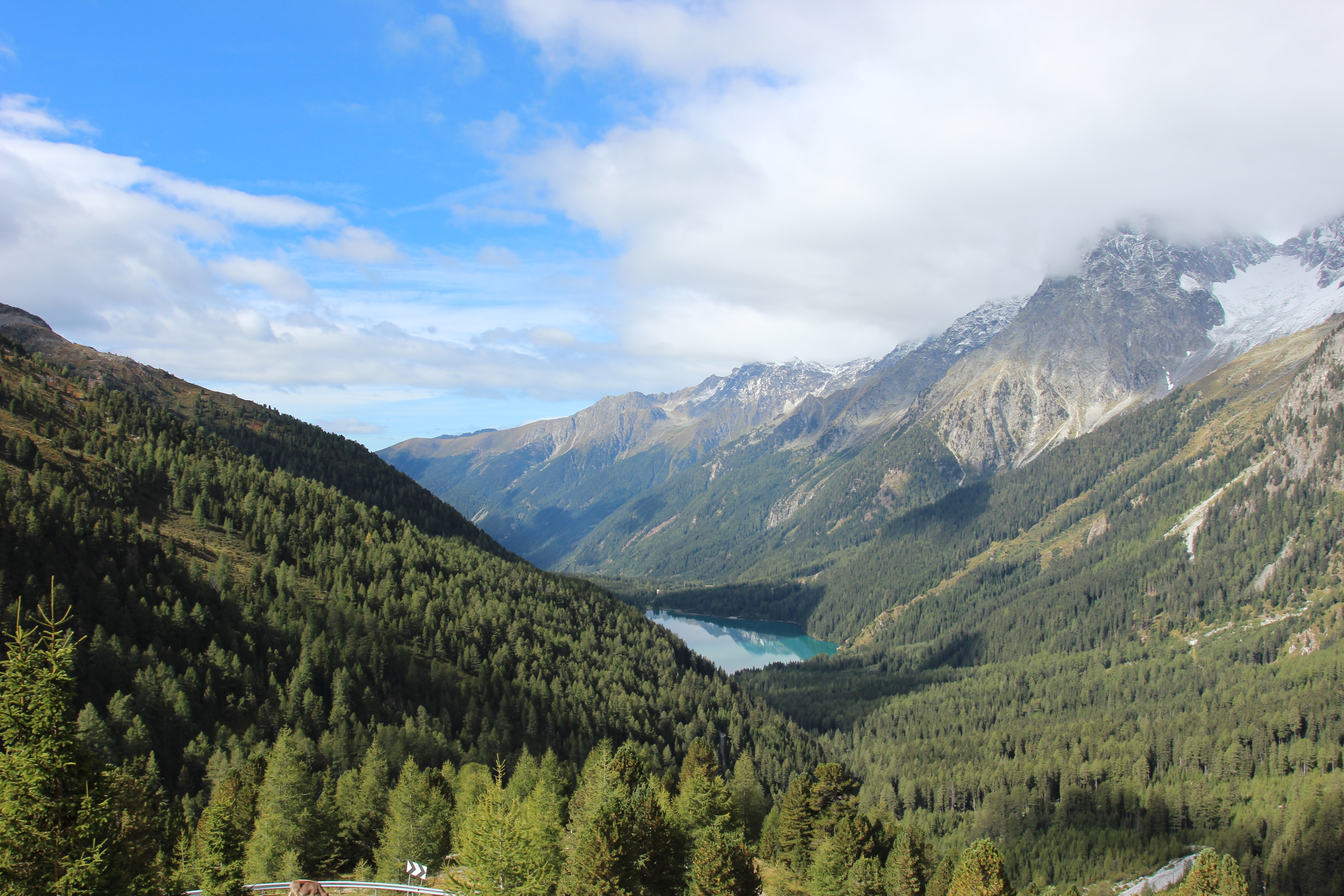 Antholzer See vom Staller Sattel aus gesehen.